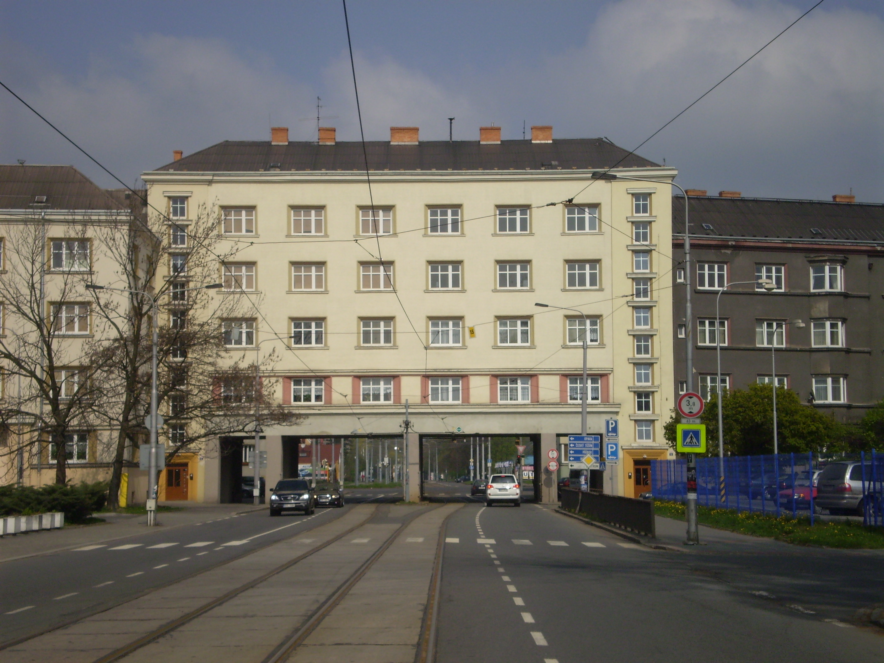 Dům u ČEZ arény v Ostravě, pod nímž projíždějí tramvaje.